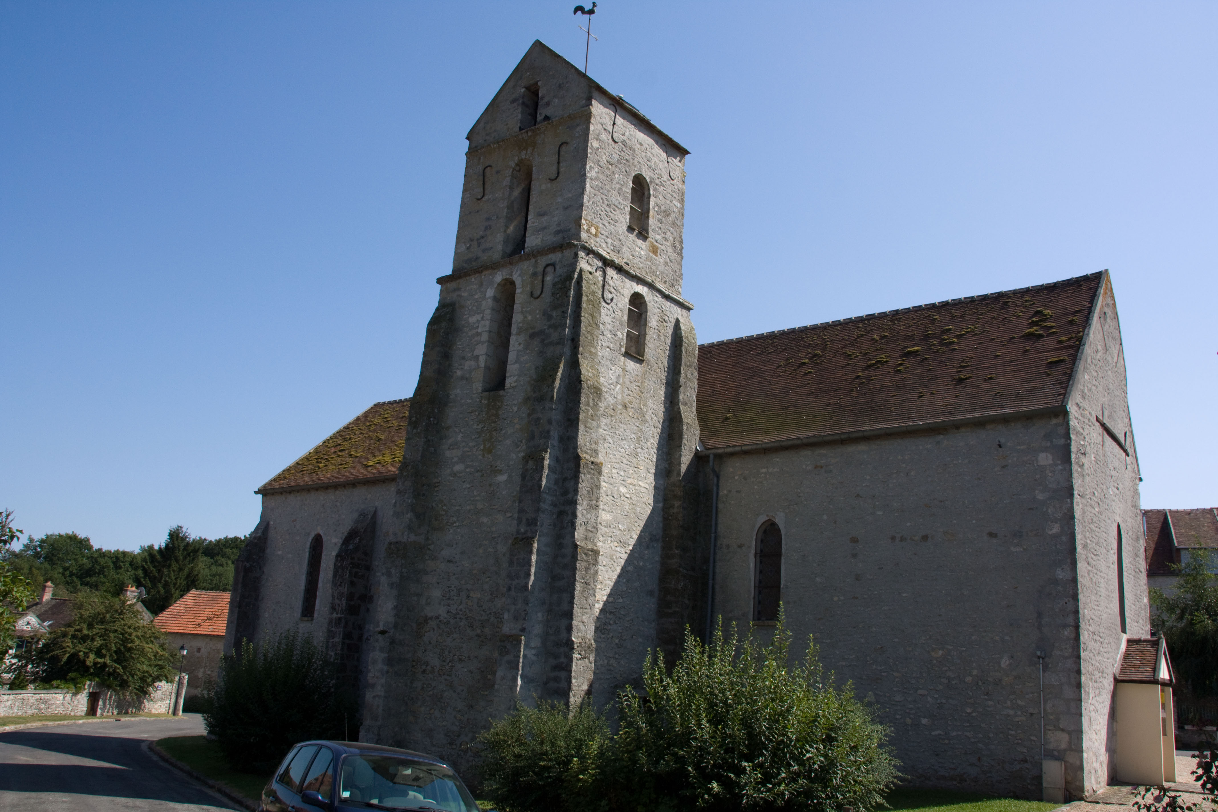 Église de Prunay-sur-Essonne, Essonne, France